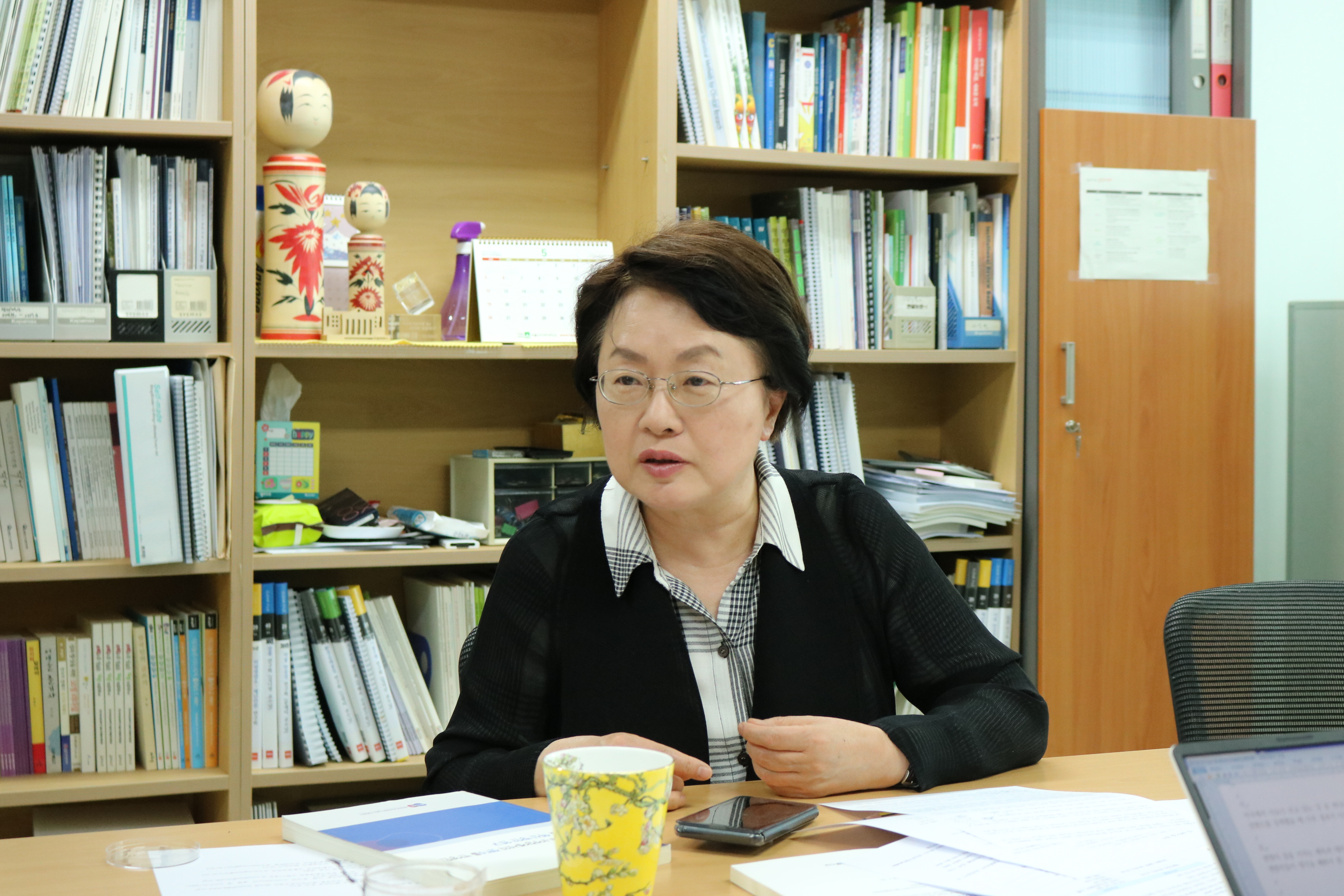 2019년 5월 22일 한겨레 인터뷰 중